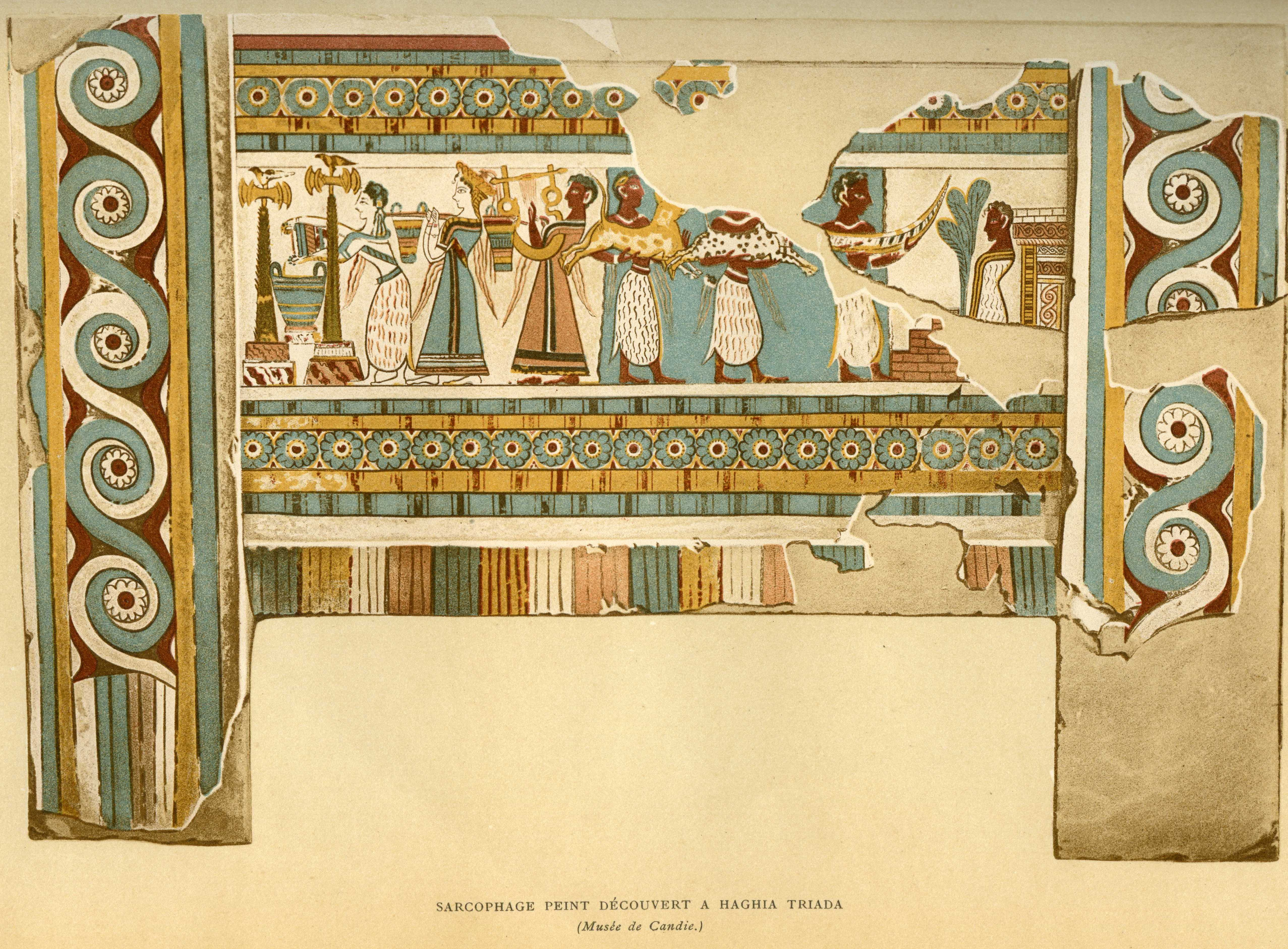 Sarcophage d'Haghia Triada, planche de l'article de la Gazette des Beaux Arts